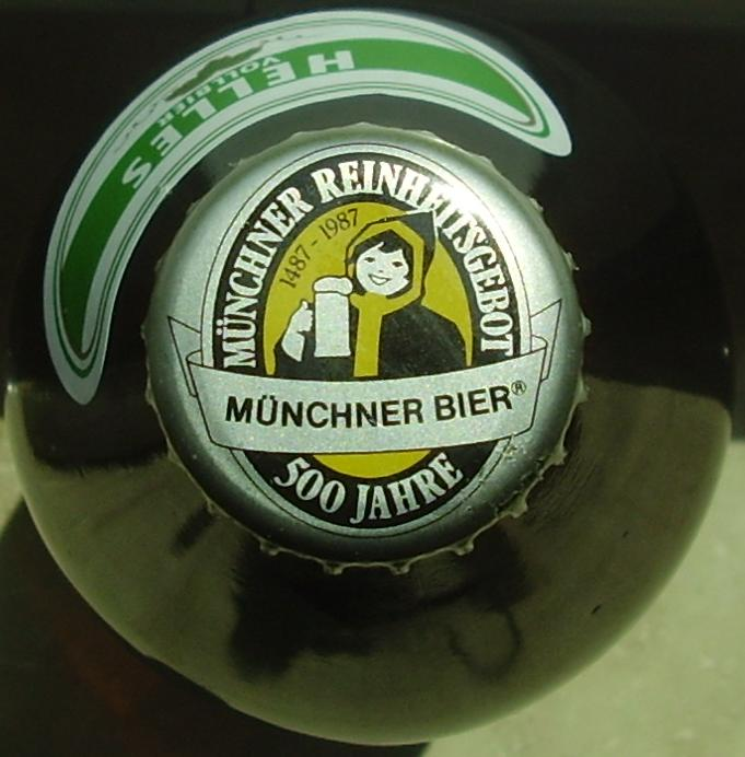 Kronkorken mit Aufdruck "500 Jahre Münchner Reinheitsgebot 1487 - 1987" einer Augustiner-Bierflasche.